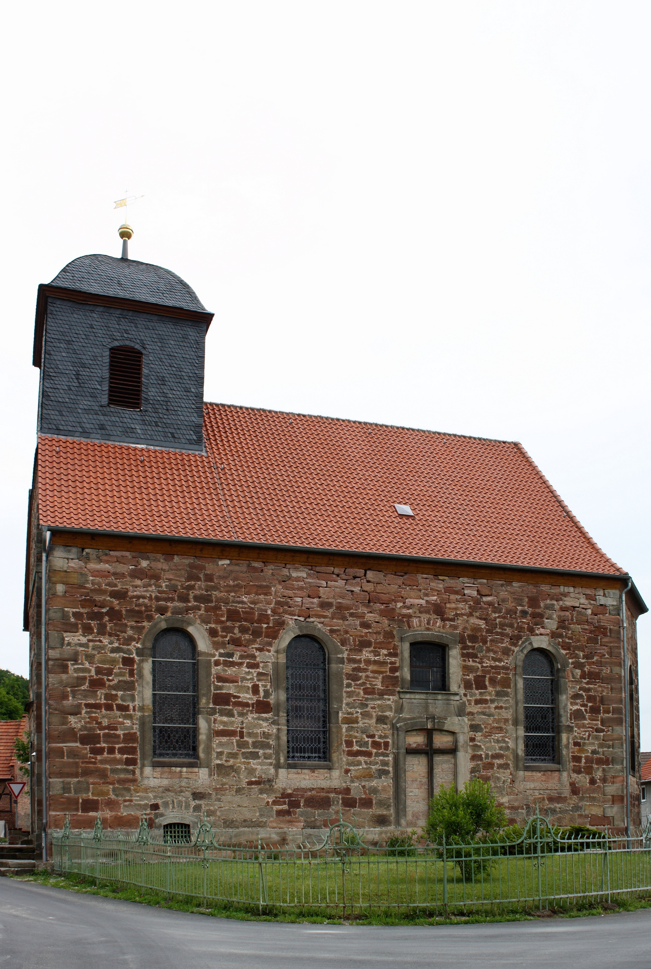 Evangelische Kirche Der Gute Hirte von Großtöpfer, einem Ortsteil von Geismar im Landkreis Eichsfeld (Thüringen), seit 2010 Radwegekirche